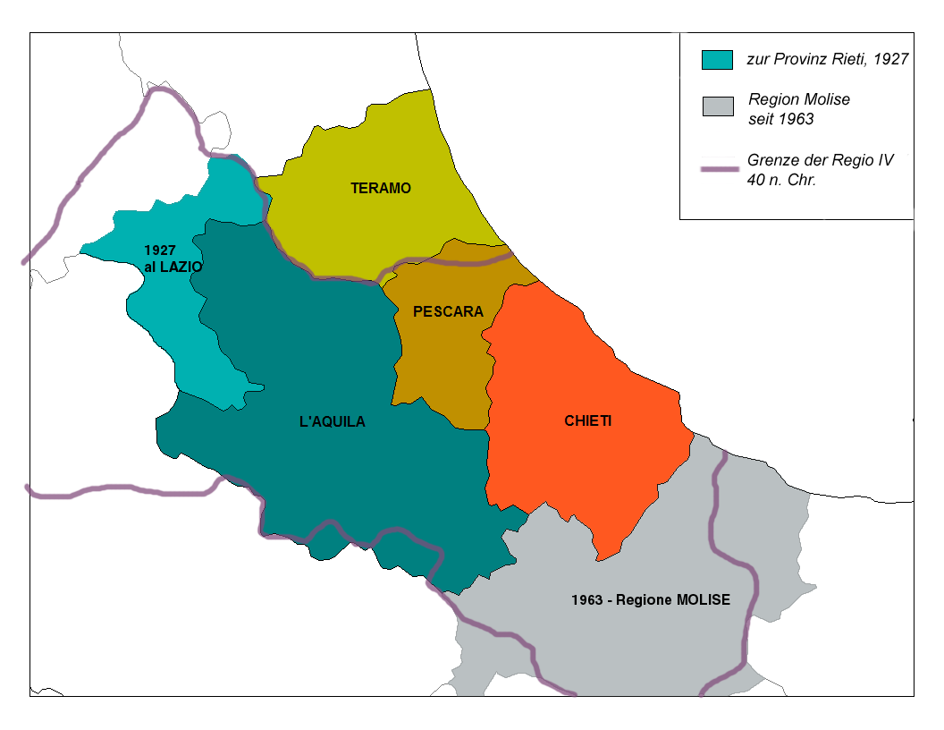 Grenzänderungen der Region Abruzzo